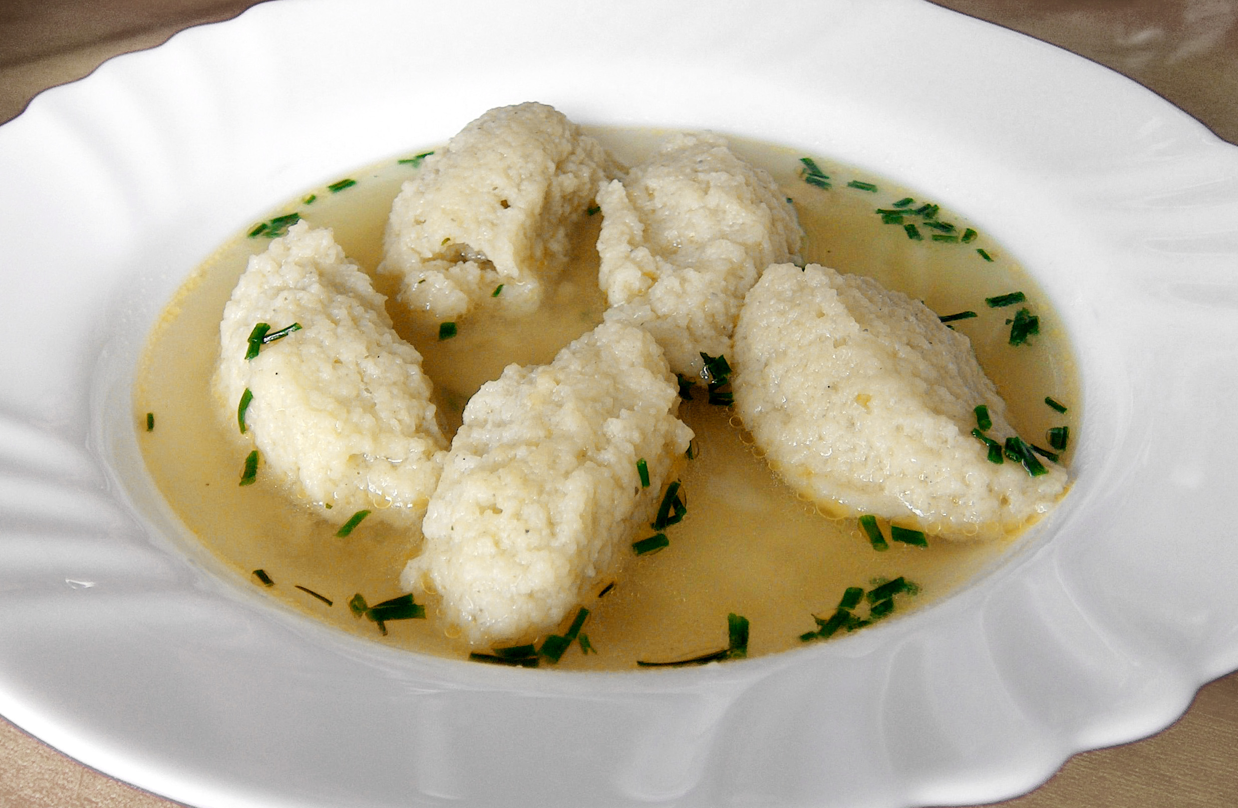 Grießklößchen